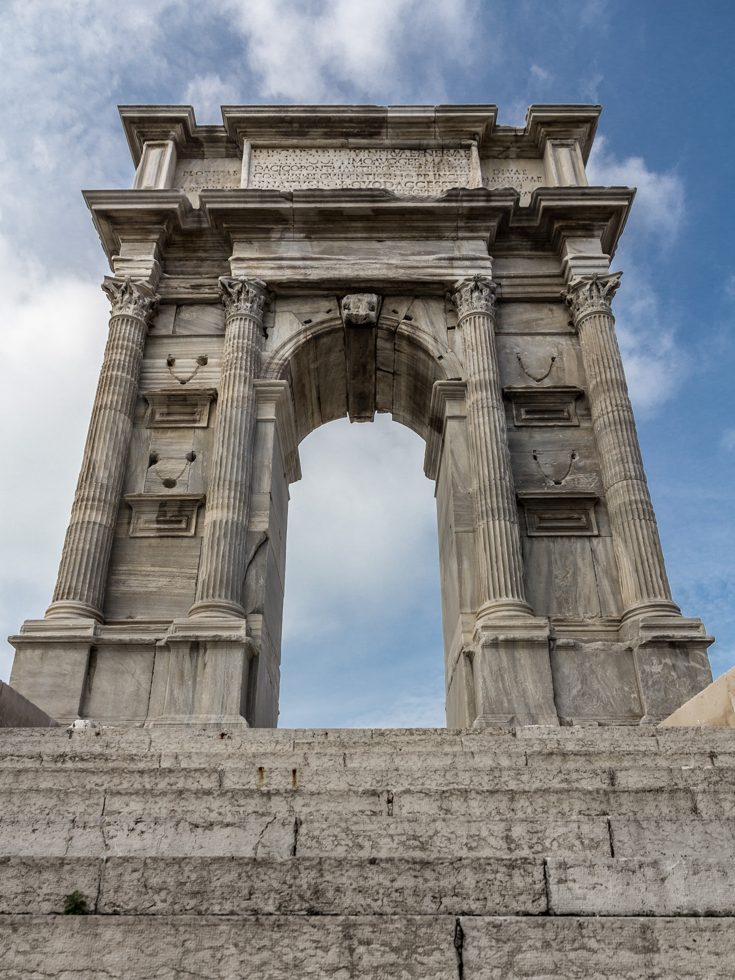 Arco di Traiano This is a photo of a monument which is part of cultural heritage of Italy.